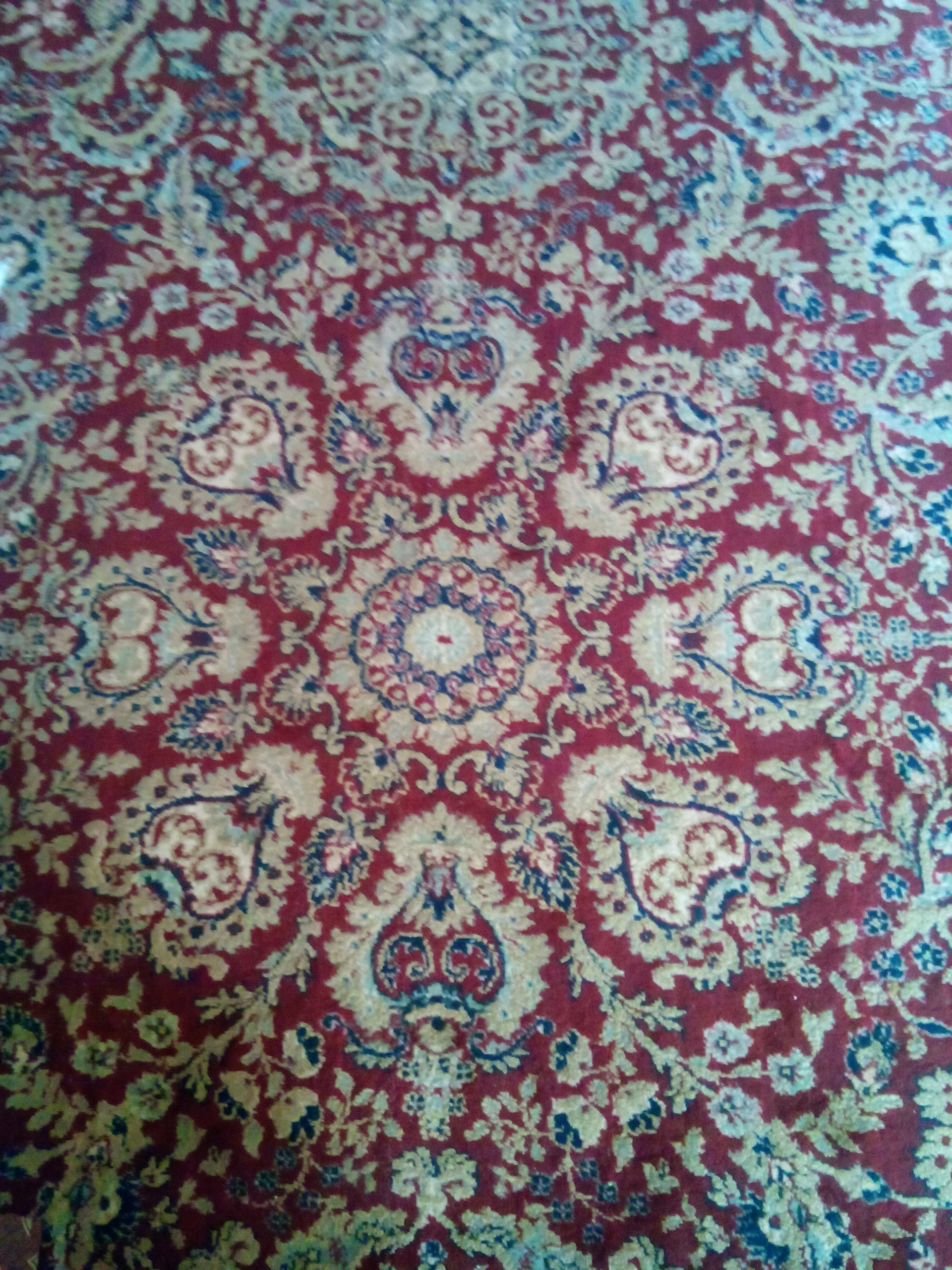 زخرفة نباتية على سجادة